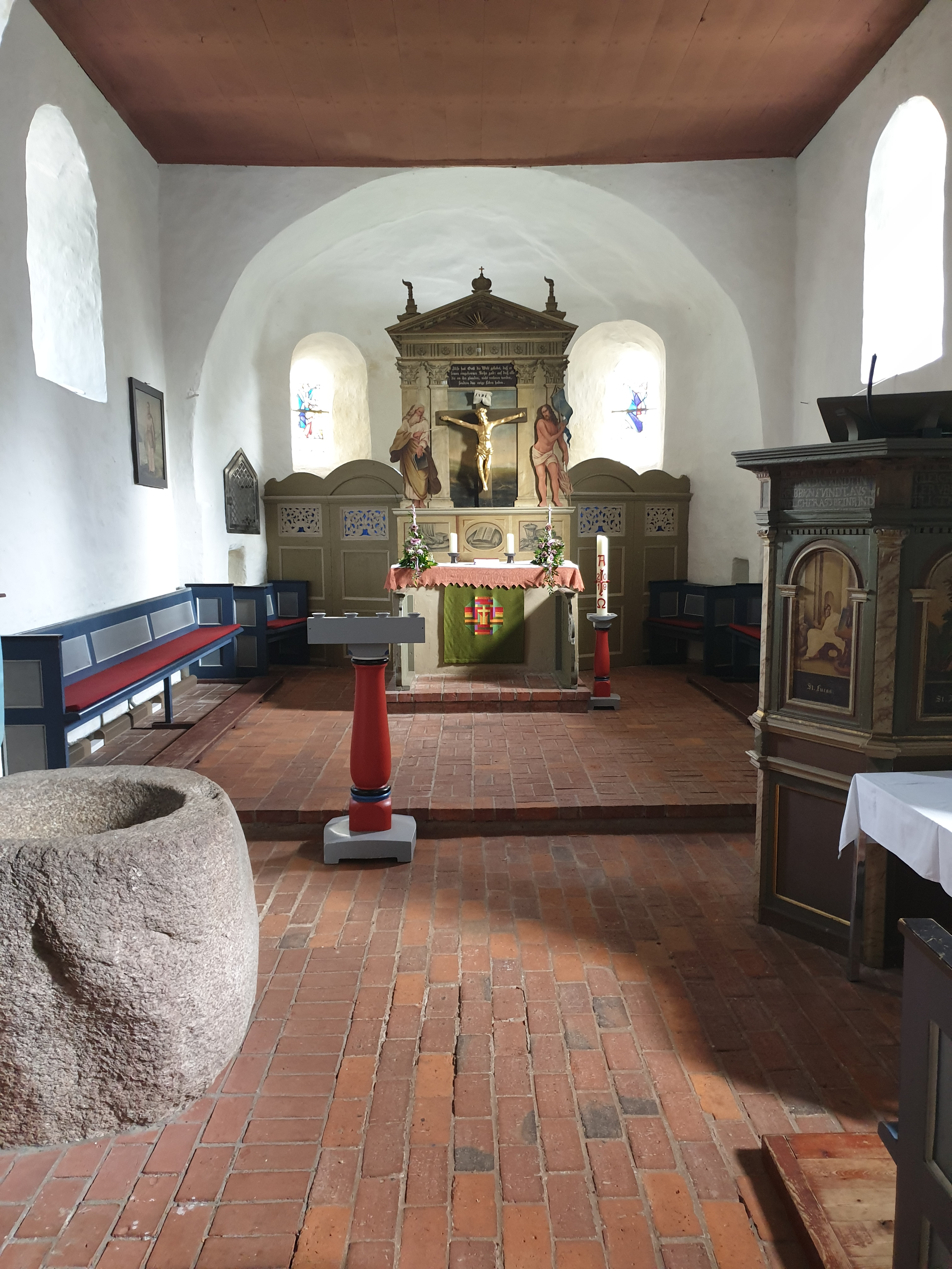 Altarraum der Kirche St. Petri auf der Horst in Burweg, Landkreis Stade (Nds.)